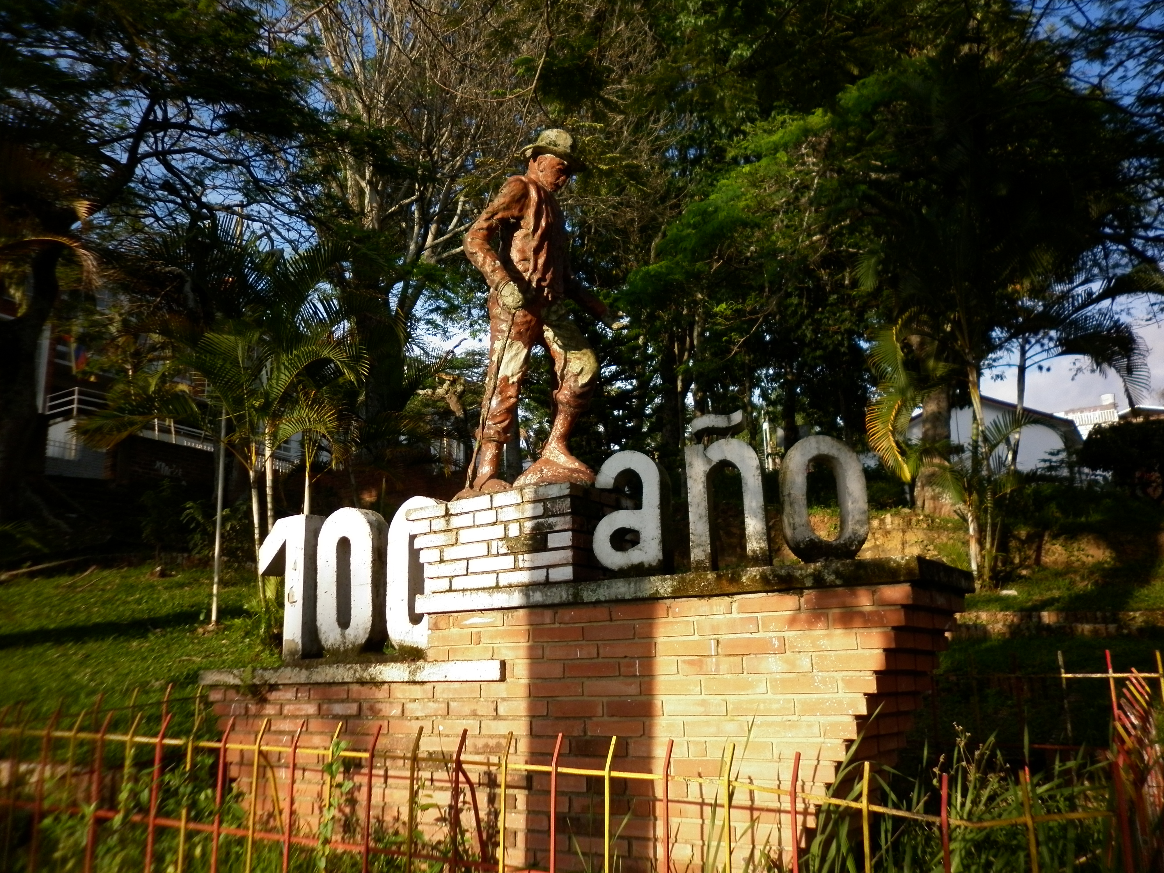 Parque de los 100 años - Foto Oswaldo Bernal